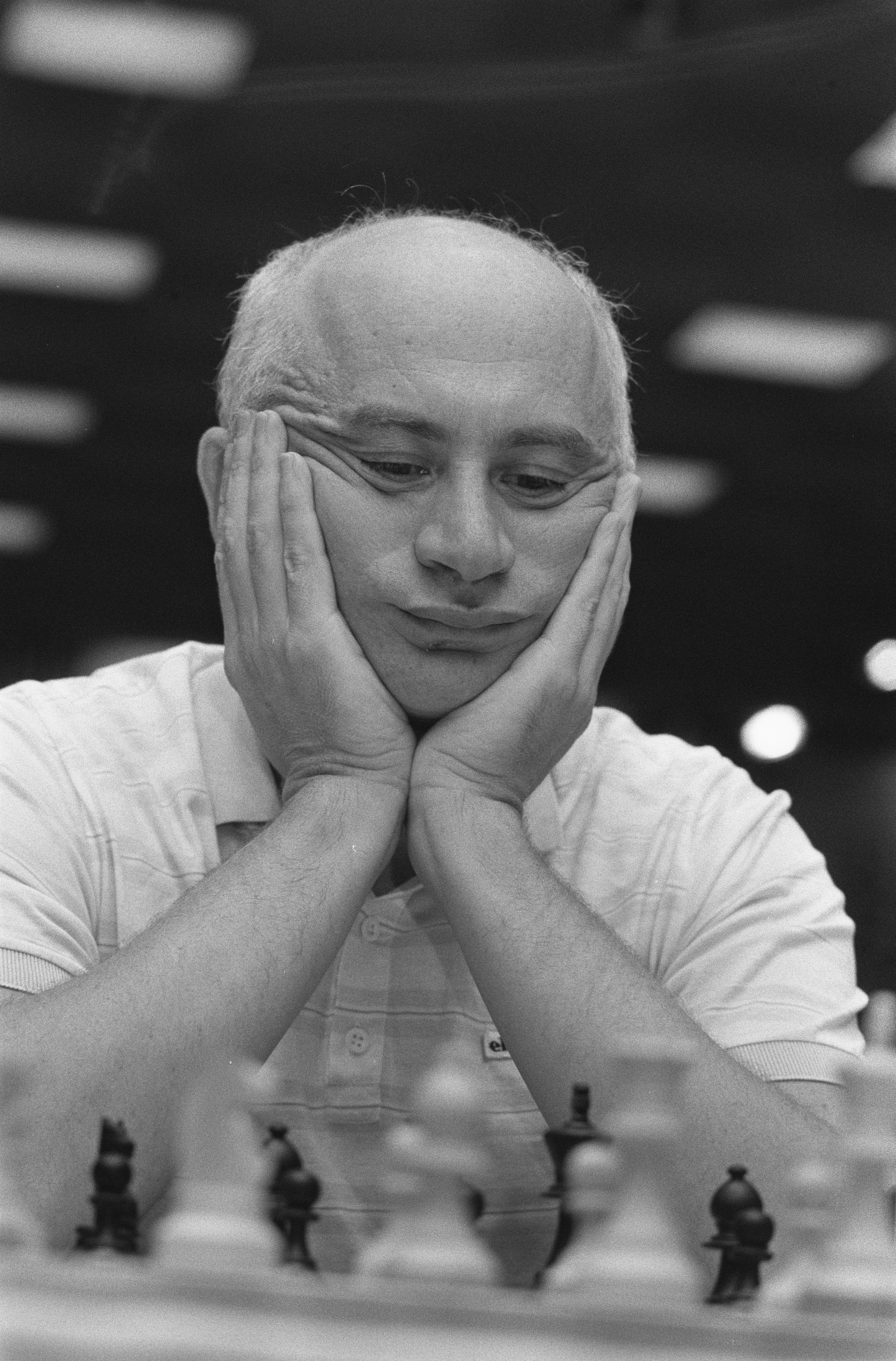 Ohra schaaktoernooi Amsterdam 1987, 3e ronde; Gulko in actie.